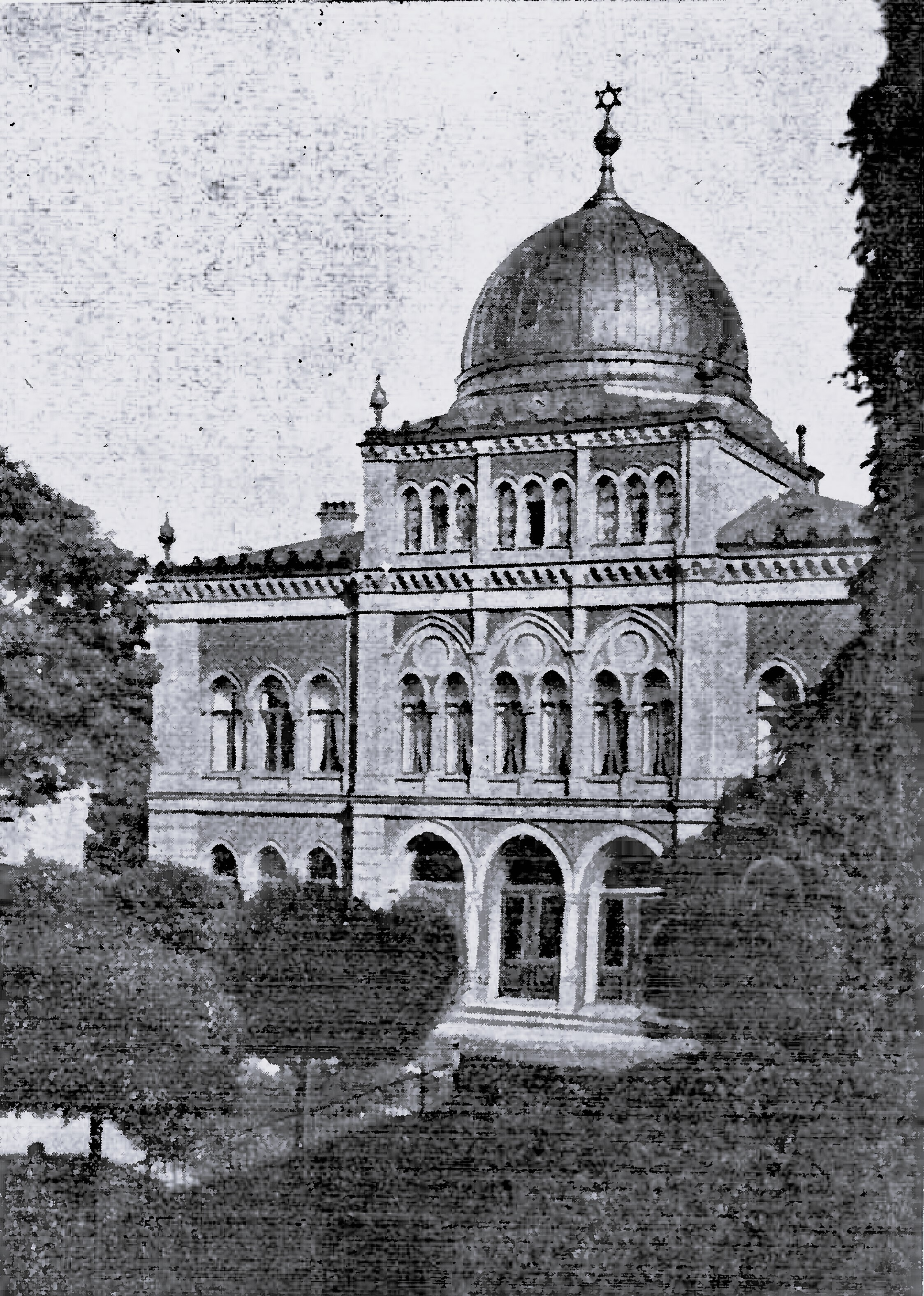 1880 eingeweihte Synagoge in Lübeck